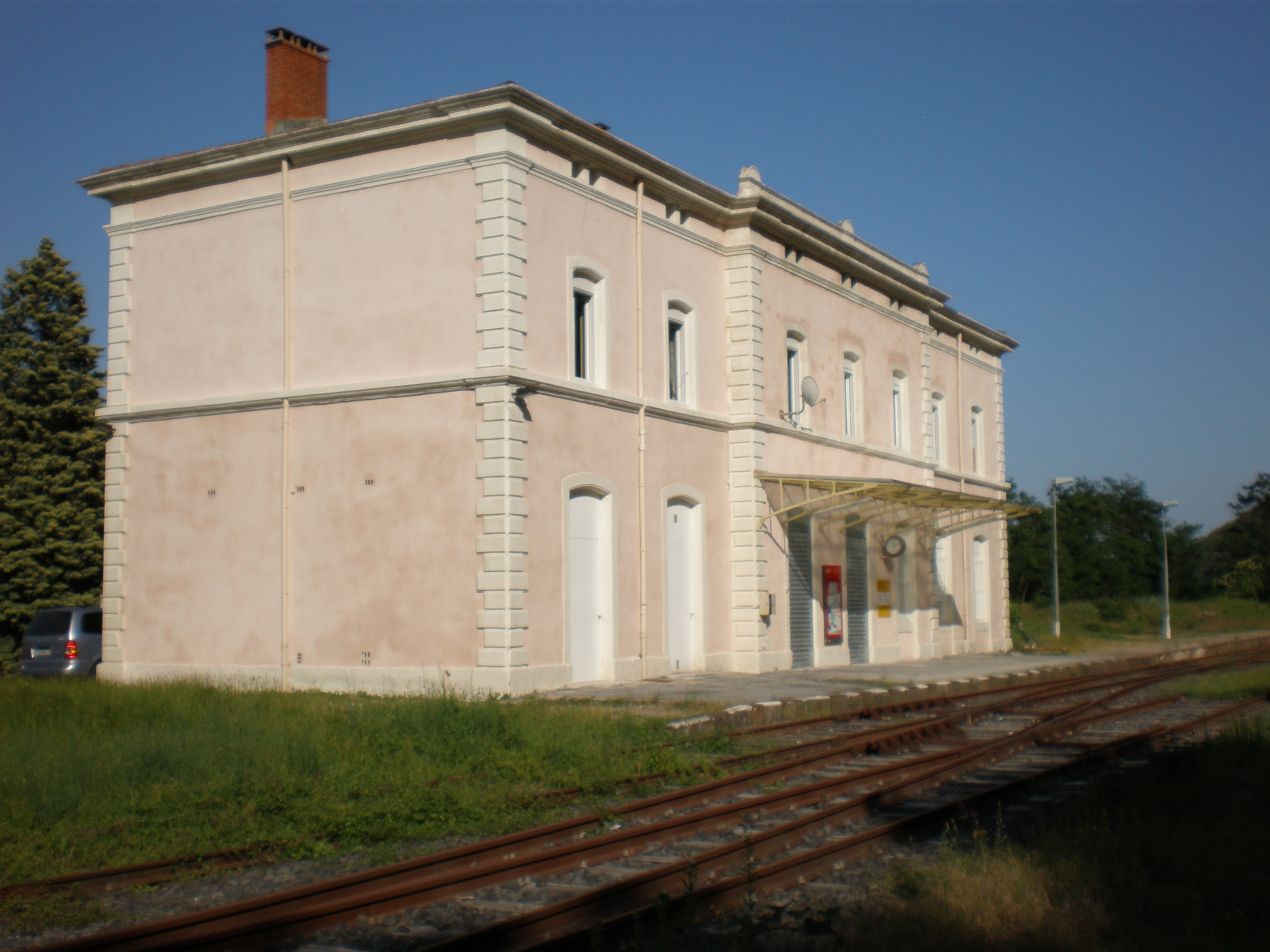 La gare de Bessèges (terminus de la ligne Alès-Bessèges) Photo prise par Vpe en mai 2009. photographie personnelle, si vous voulez utiliser cette image, merci d'en indiquer la source.